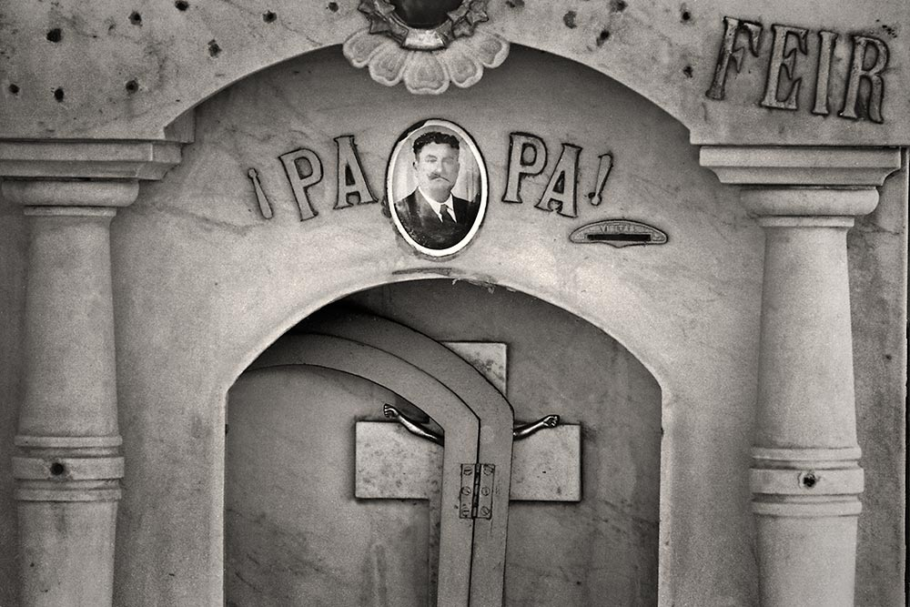 Foto de Andy Goldstein perteneciente a la serie La Muerte de la Muerte, Argentina, 1979.